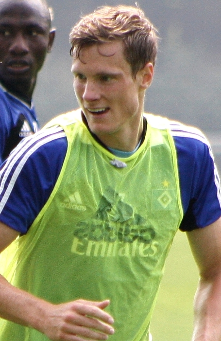 Marcell Jansen beim HSV-Training am 25. Juli 2013.